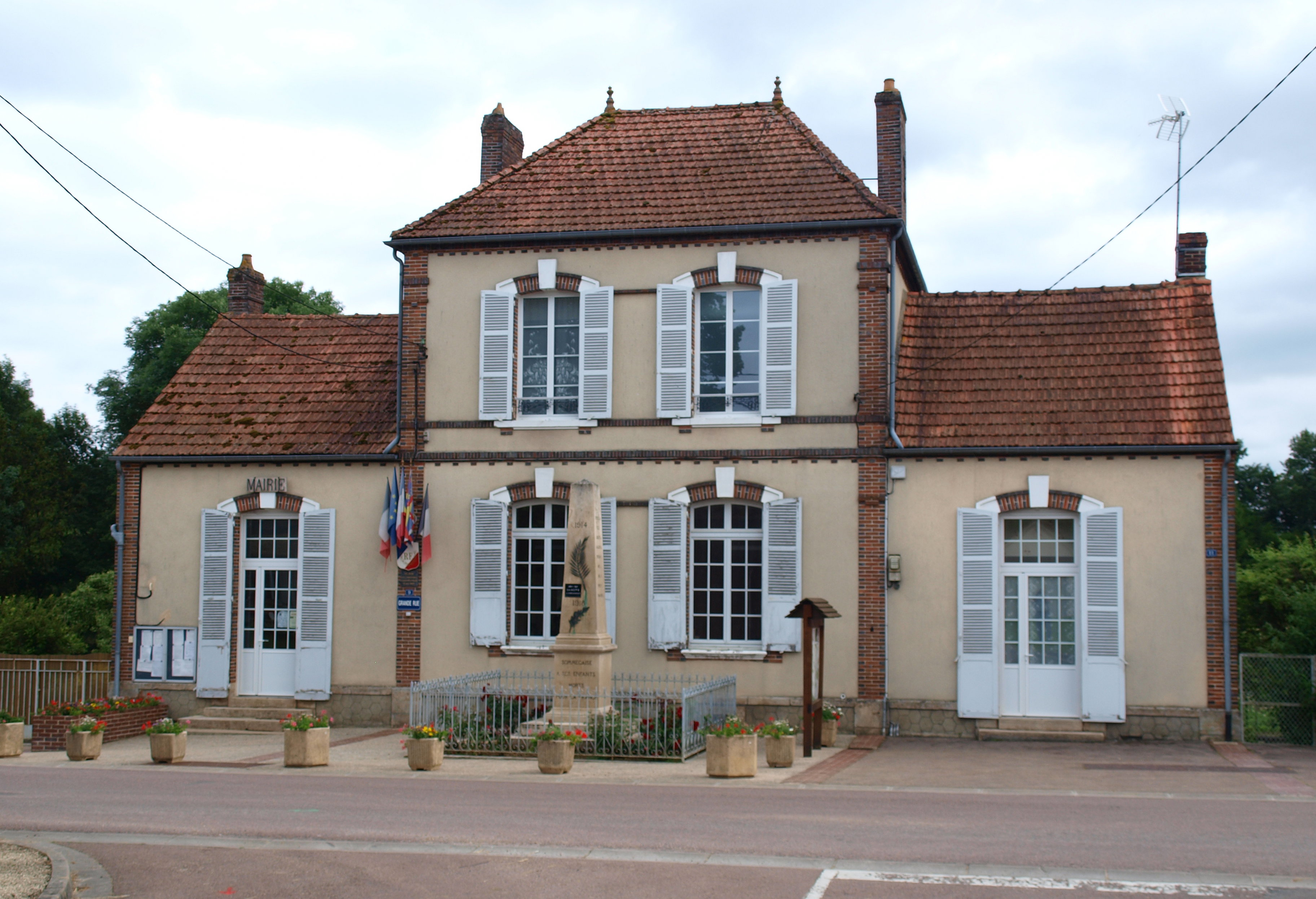 Sommecaise (Yonne, France) - la mairie.